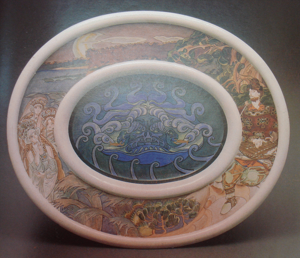 Роспись М.А. Врубель. Дулевский фарфоровый завод.